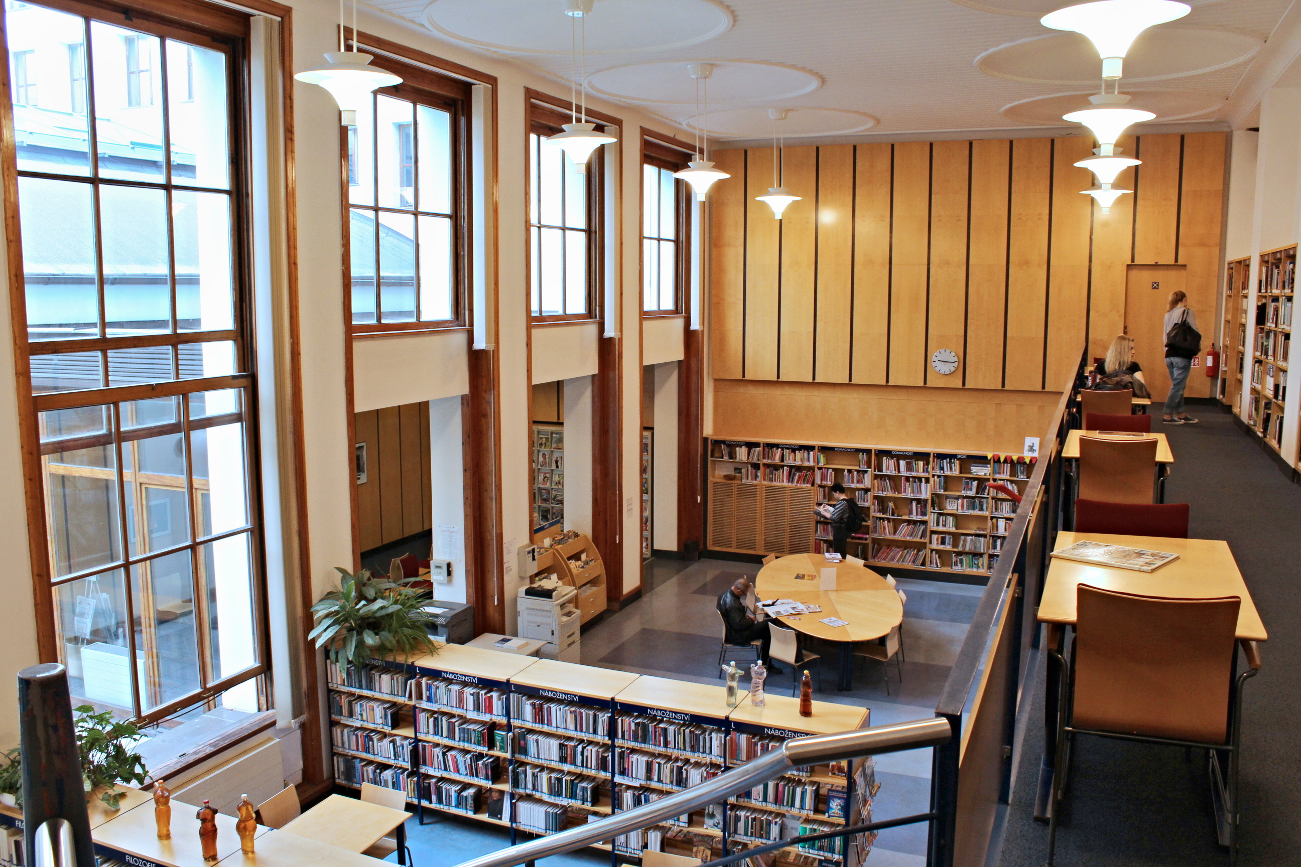 Městská knihovna v Praze, interiér